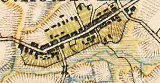 План деревни Старая. 1885 г.